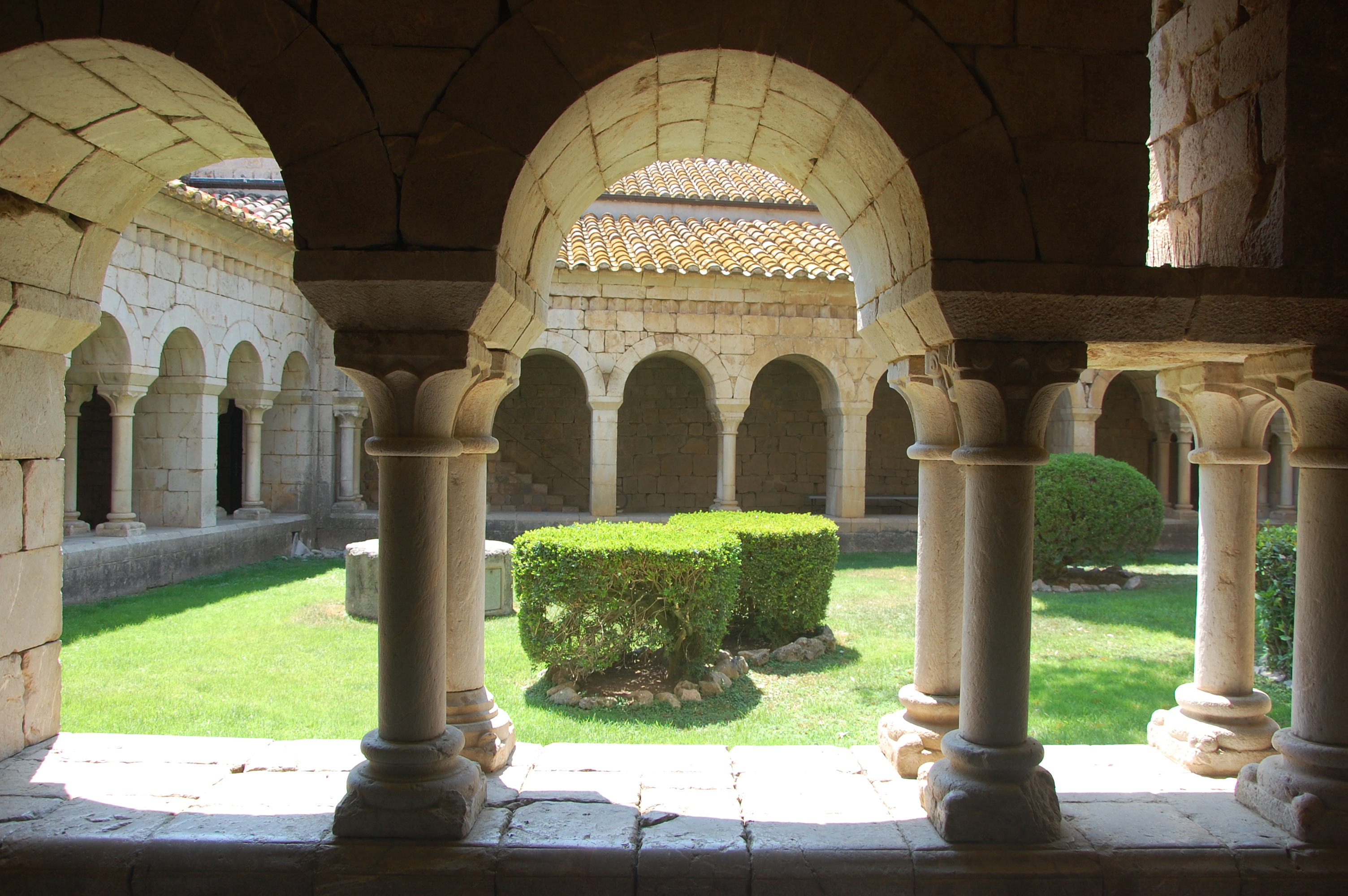 Claustro del monestir de Vilabertran.